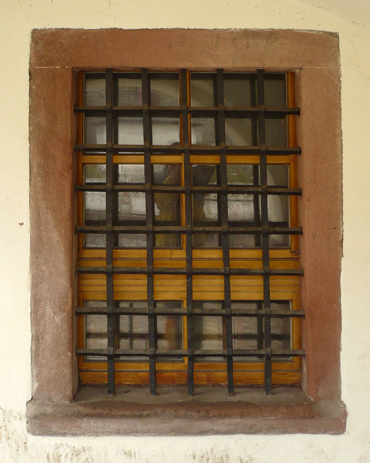 Nowa Ruda, ul. Nadrzeczna 3 - okno domu tkaczy, XVIII/XIX w., przebud. w XX w. (zabytek nr A/942/1566 z 16.03.1966)